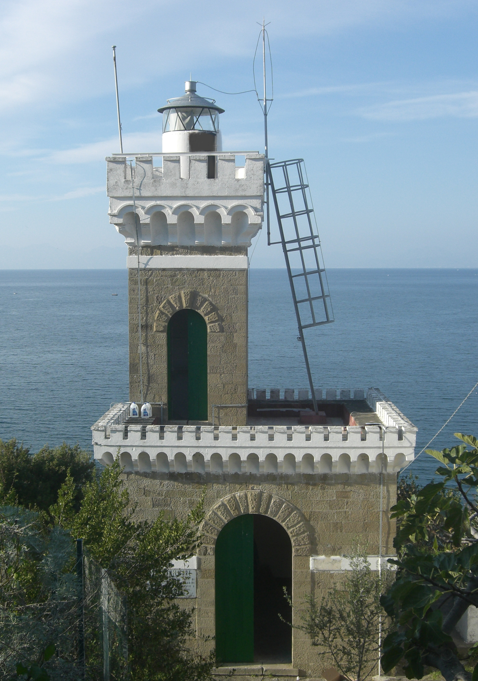 Carlo Iannuzzi, Opera Propria, Agropoli . Il Faro, GFDL e Creative Commons CC-BY-SA tutte le versioni (3.0, 2.5, 2.0 e 1.0), sono l'autore